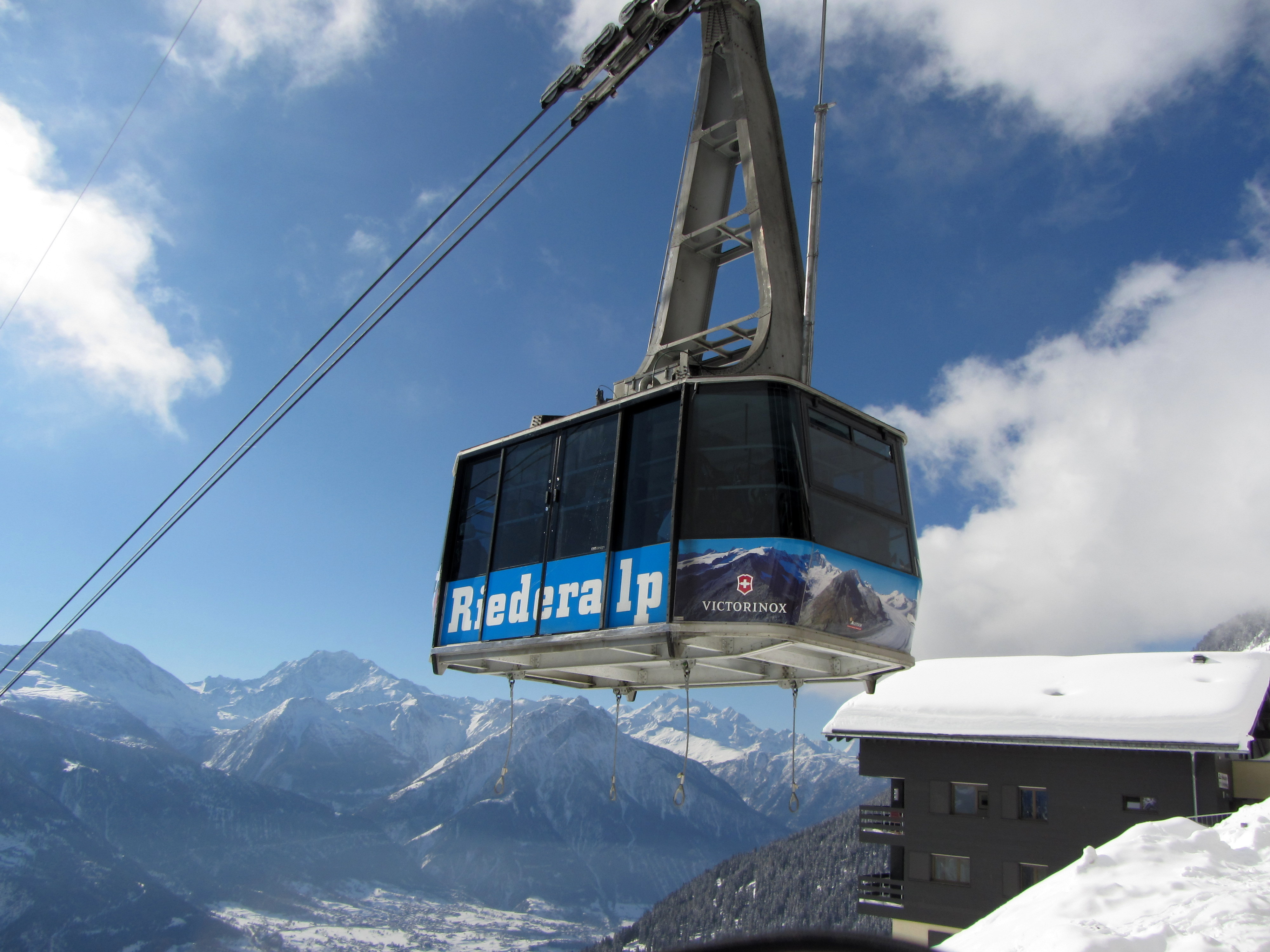 Riederalp